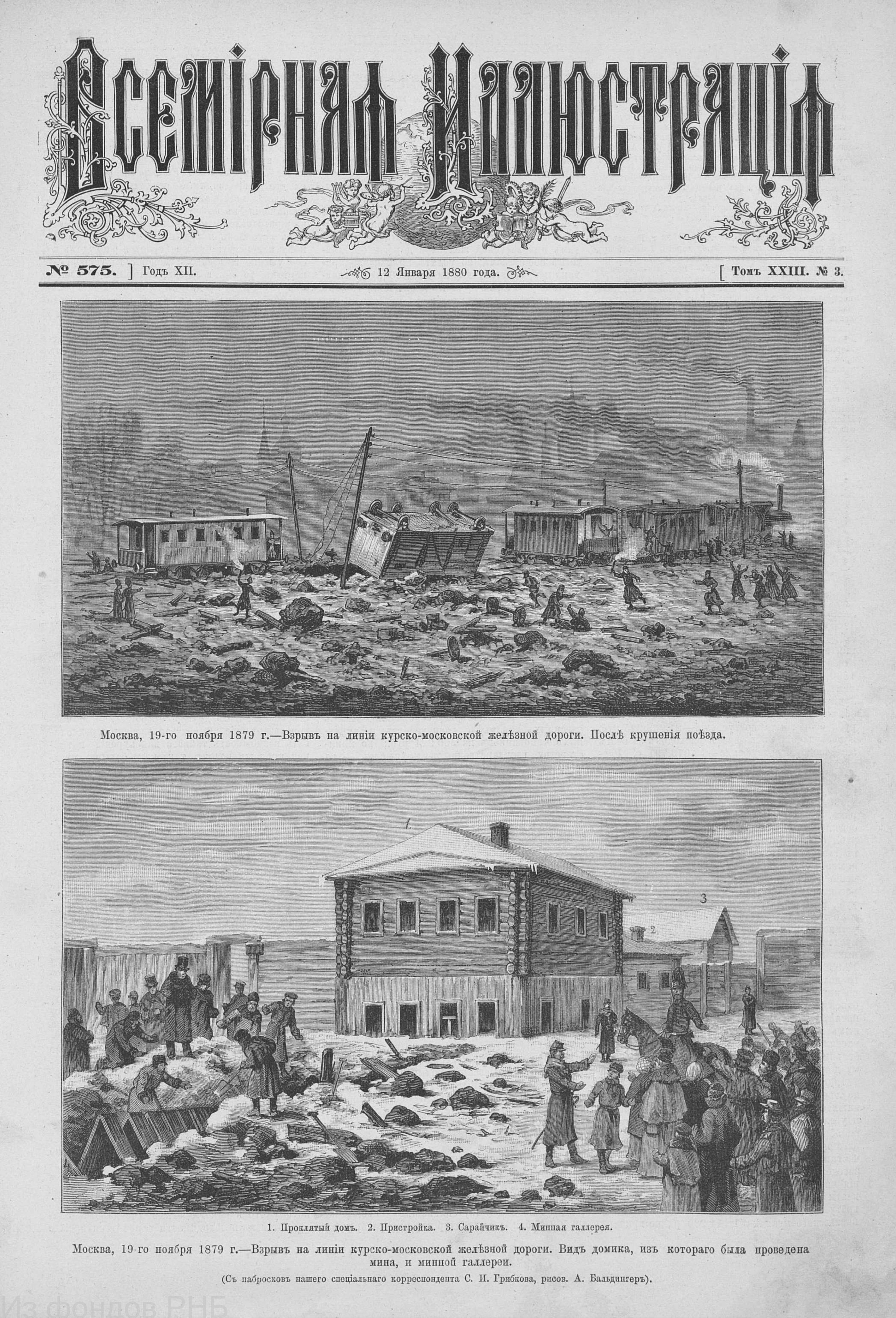 Обложка журнала "Всемирная иллюстрация" за 12 января 1880 года. Взрыв царского поезда под Москвой 19 ноября 1879 года